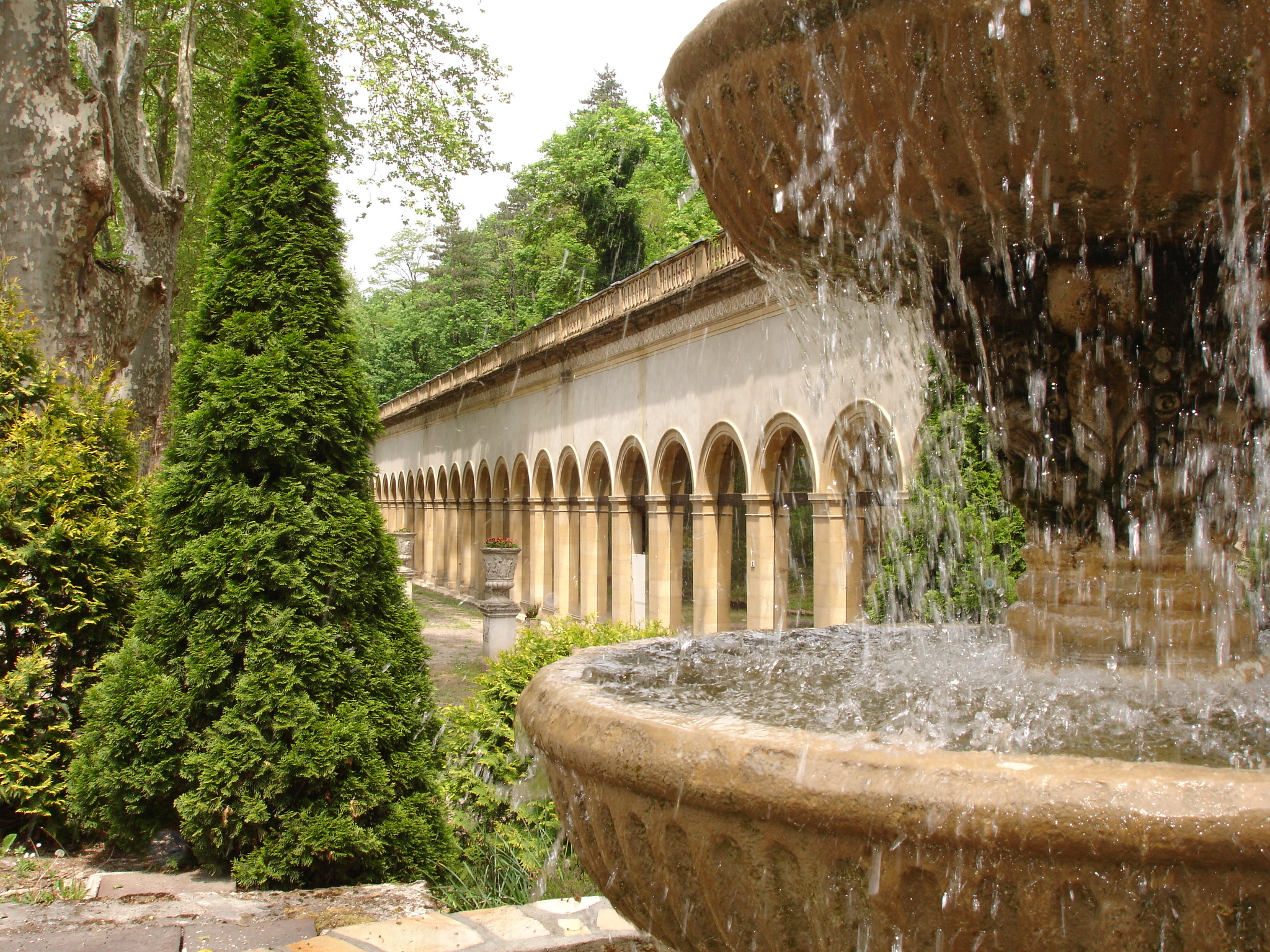 Les thermes d'Ussat-Les-bains, Ariège (09), France